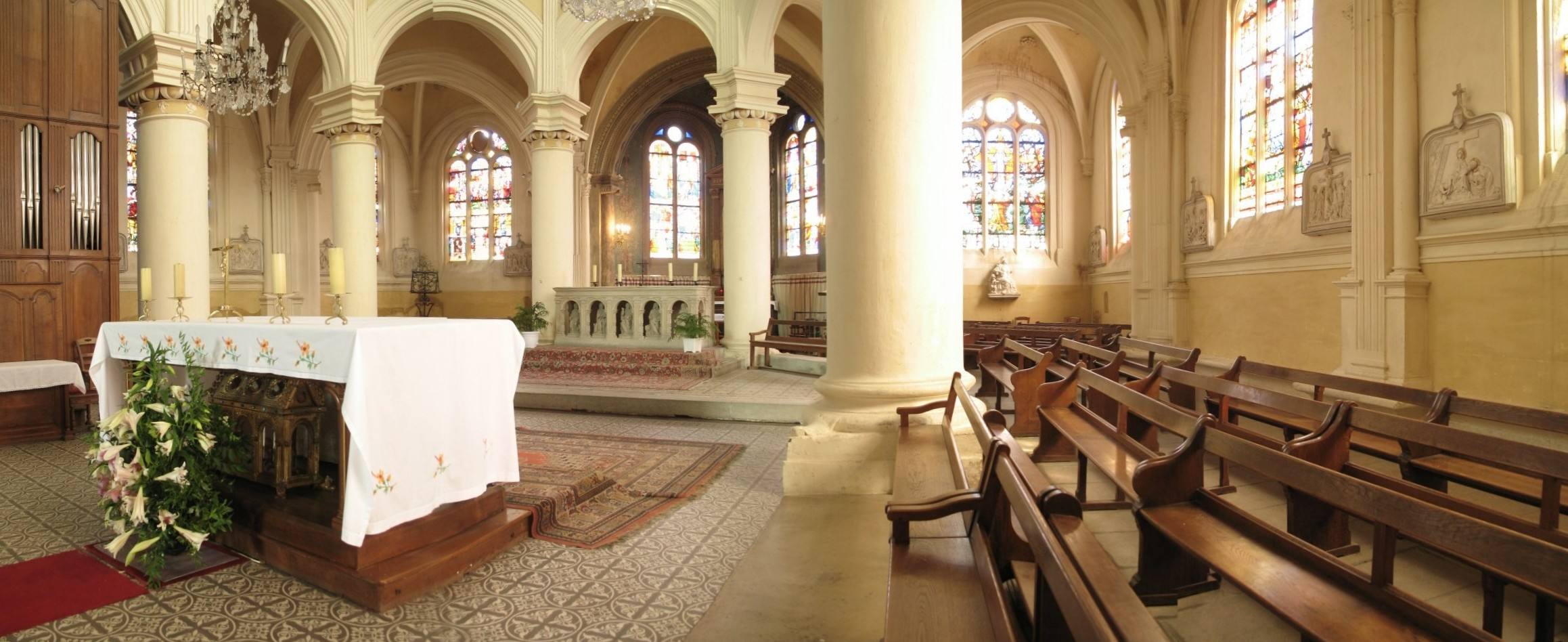 Auteur: Remi Lucet